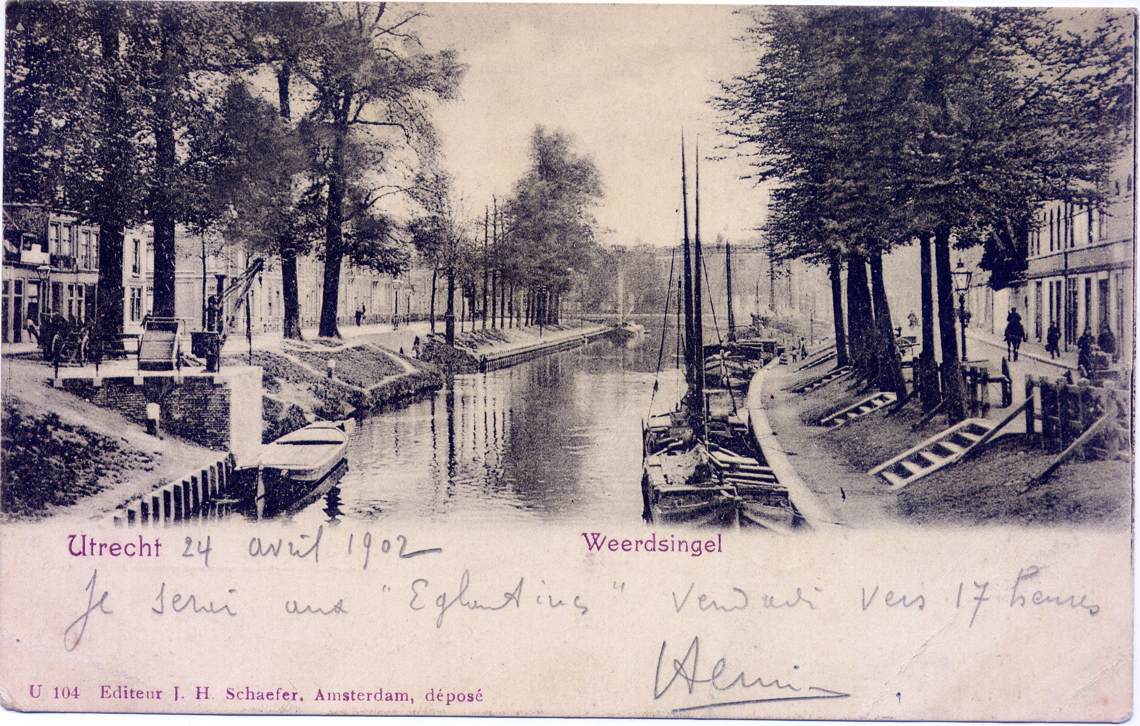 Carte postale manuscrite de l'architecte Henri van Dievoet (1869-1931) envoyé le 24 avril 1902 d'Utrecht à son frère le peintre et décorateur Art nouveau Gabriel van Dievoet (1875-1934). Cela concerne la "villa les Eglantines" à Watermael.